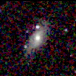 Galaxy NGC 21